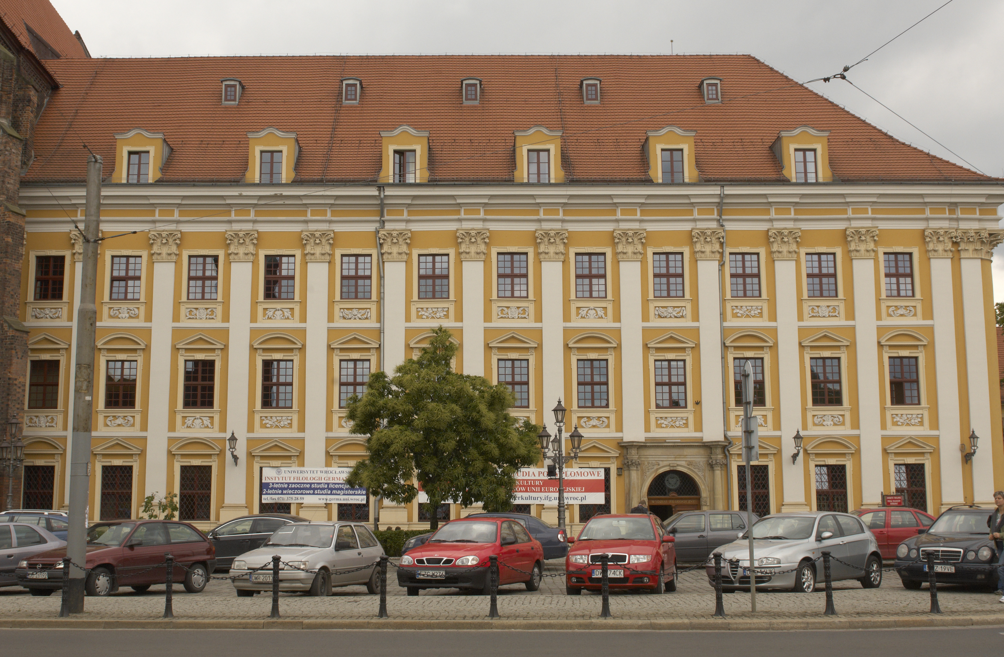 Instytut Filologii Polskiej - Uniwersytet Wrocławski